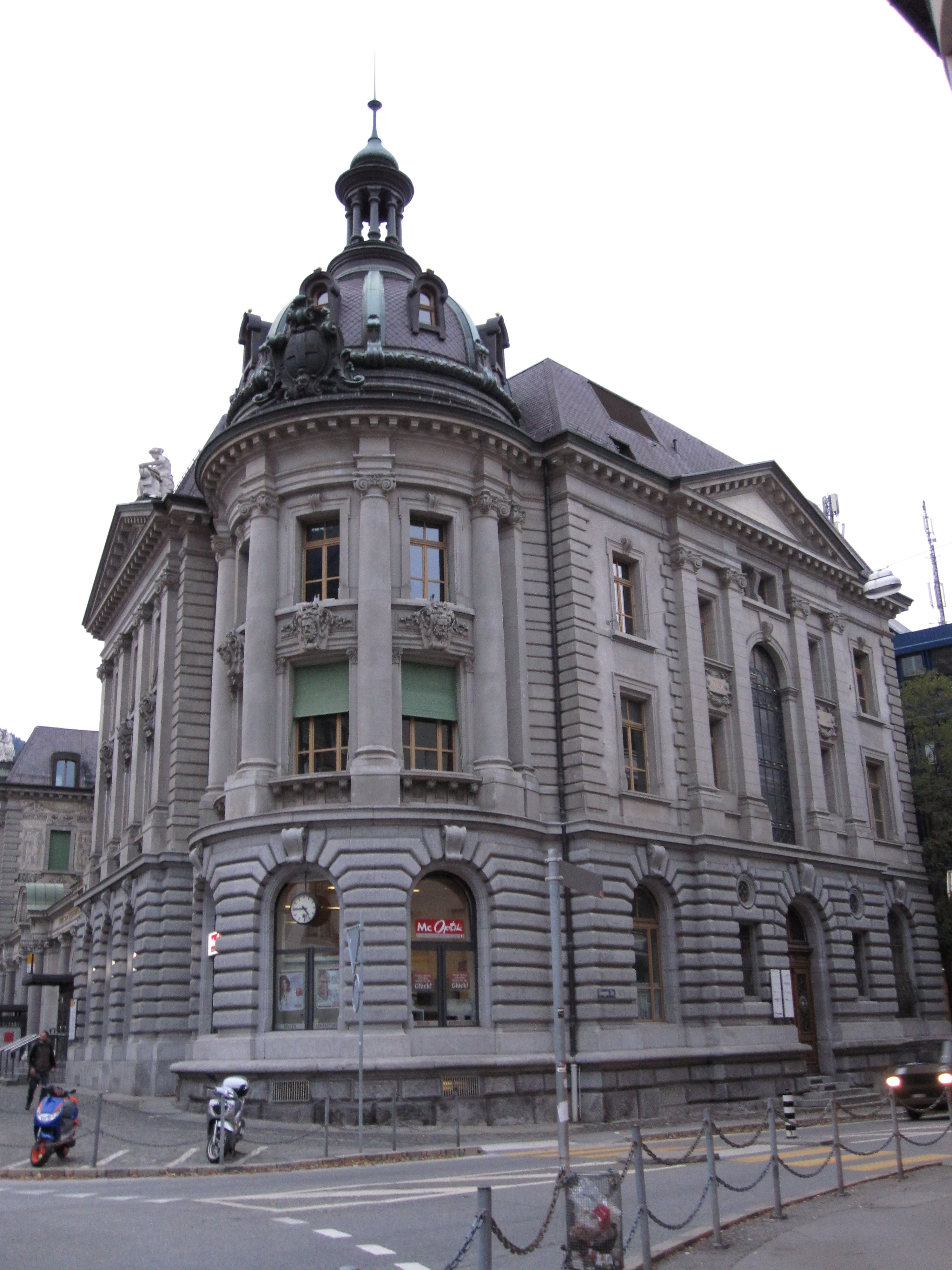 Postgebäude in Chur, Architekten: Theodor Gohl und Jean Béguin, 1905